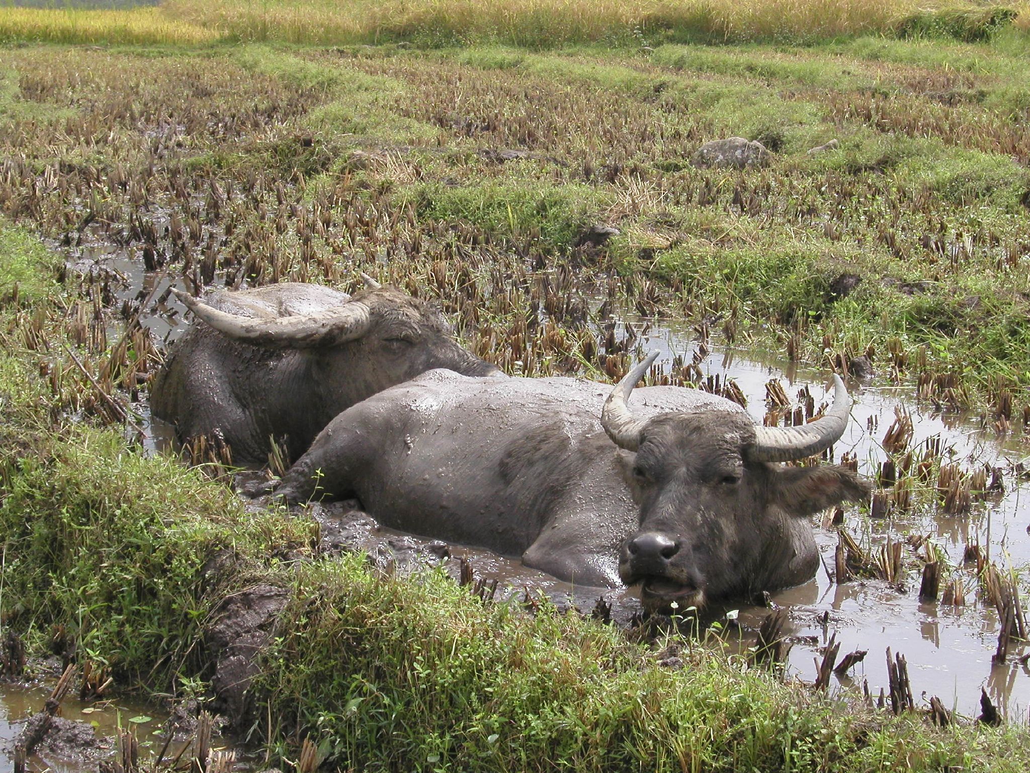 Taken in Vietnam 2004